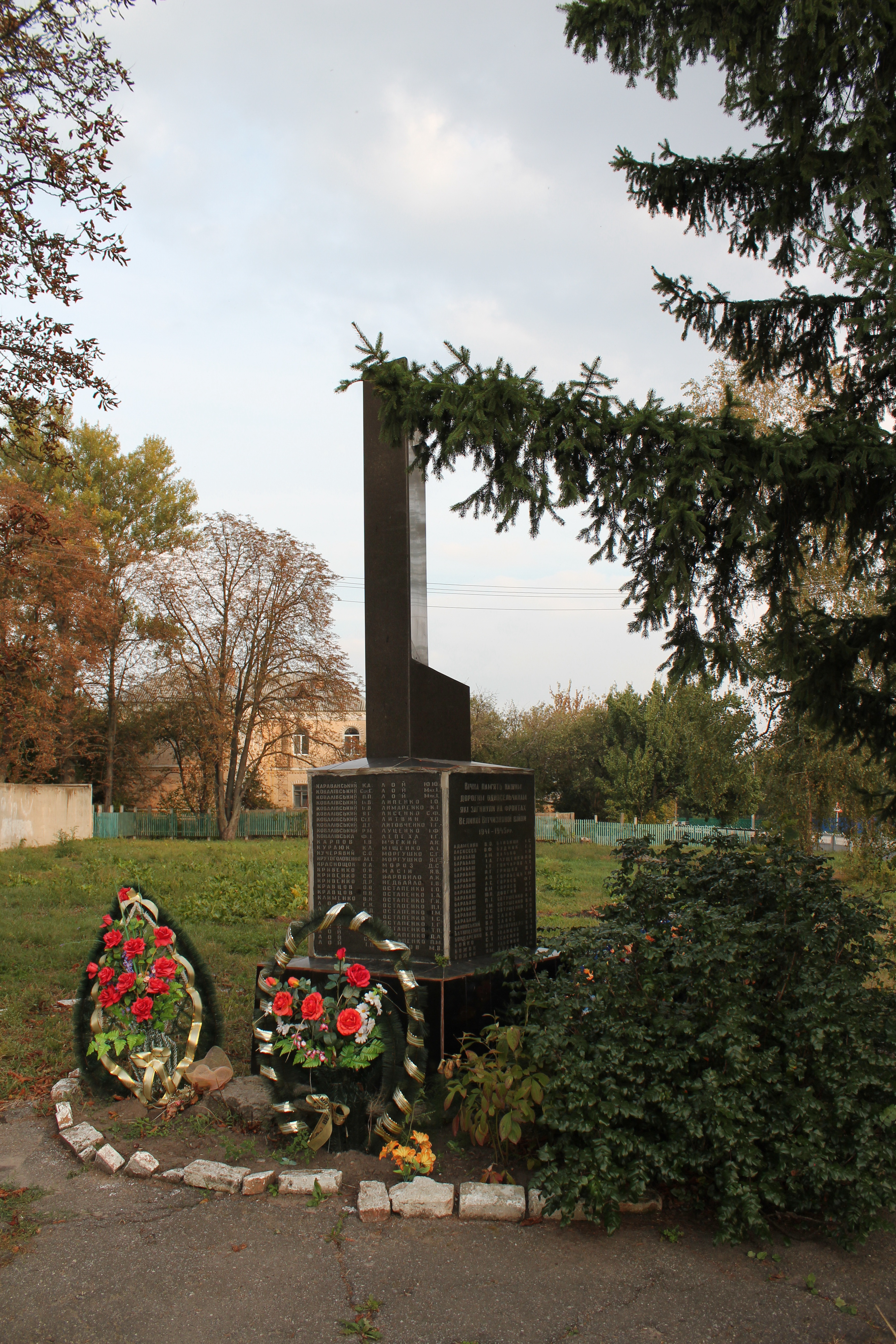 Пам'ятник воїнам-односельцям, які загинули в роки Великої Вітчизняної війни, село Переяславське, біля привокзальної площі